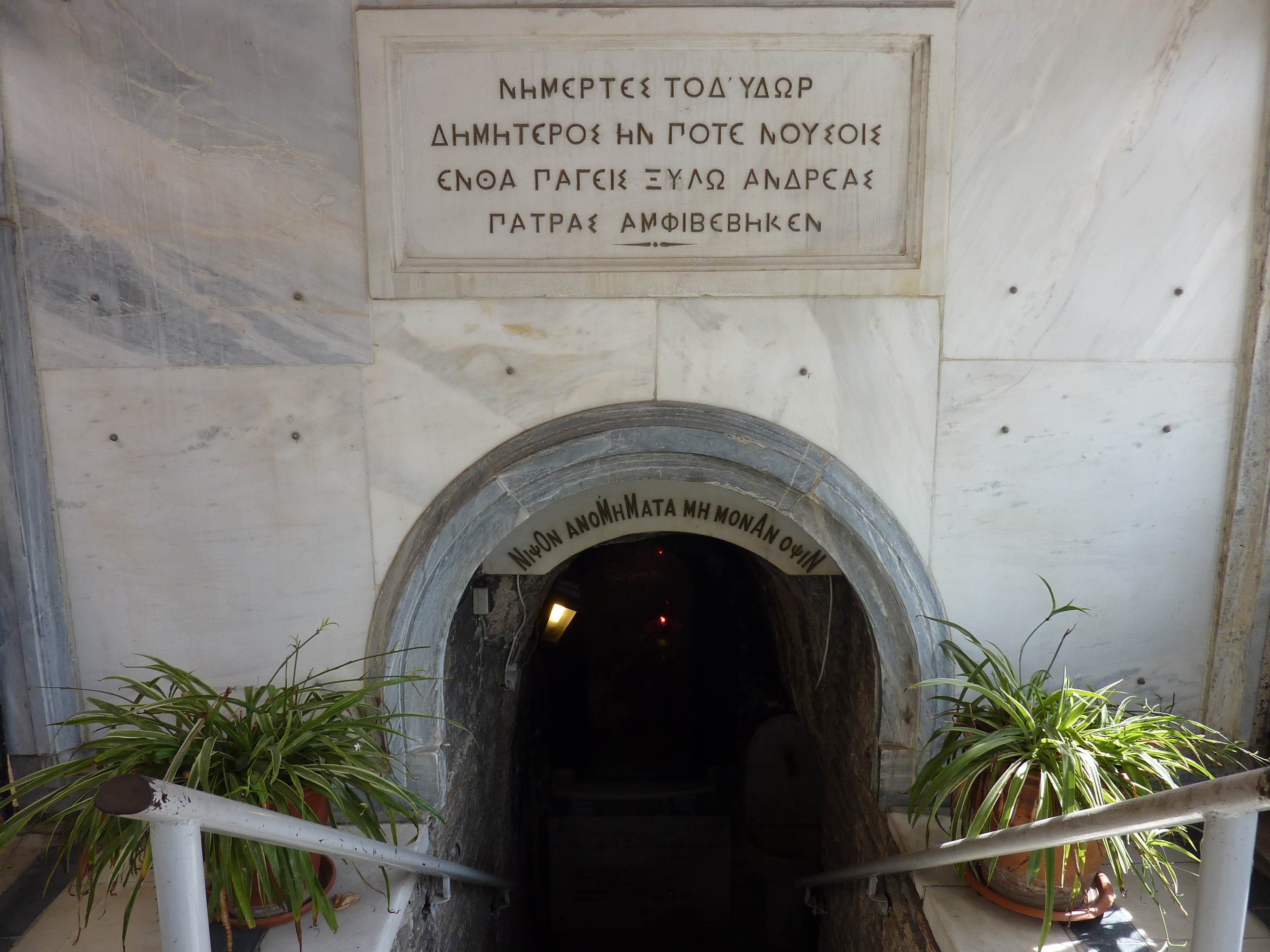 Abstieg zur Demeterquelle in Patras, Schauplatz der Kreuzigung des Apostels Andreas